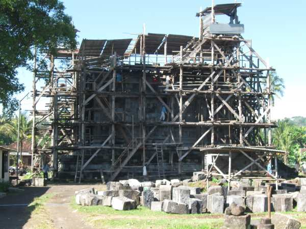 Candi Sujiwan